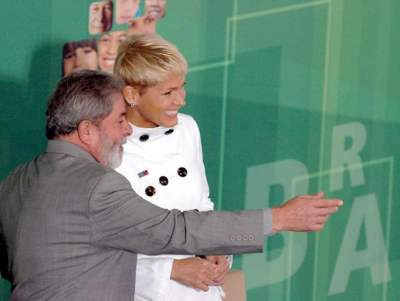 O presidente Luiz Inácio Lula da Silva e a apresentadora de TV Xuxa Meneghel, durante cerimônia de lançamento da campanha "Não Bata, Eduque!", cujo objetivo é mostrar à sociedade que castigos físicos e humilhantes não são medidas eficientes na educação de crianças Foto: Roosewelt Pinheiro/ABr